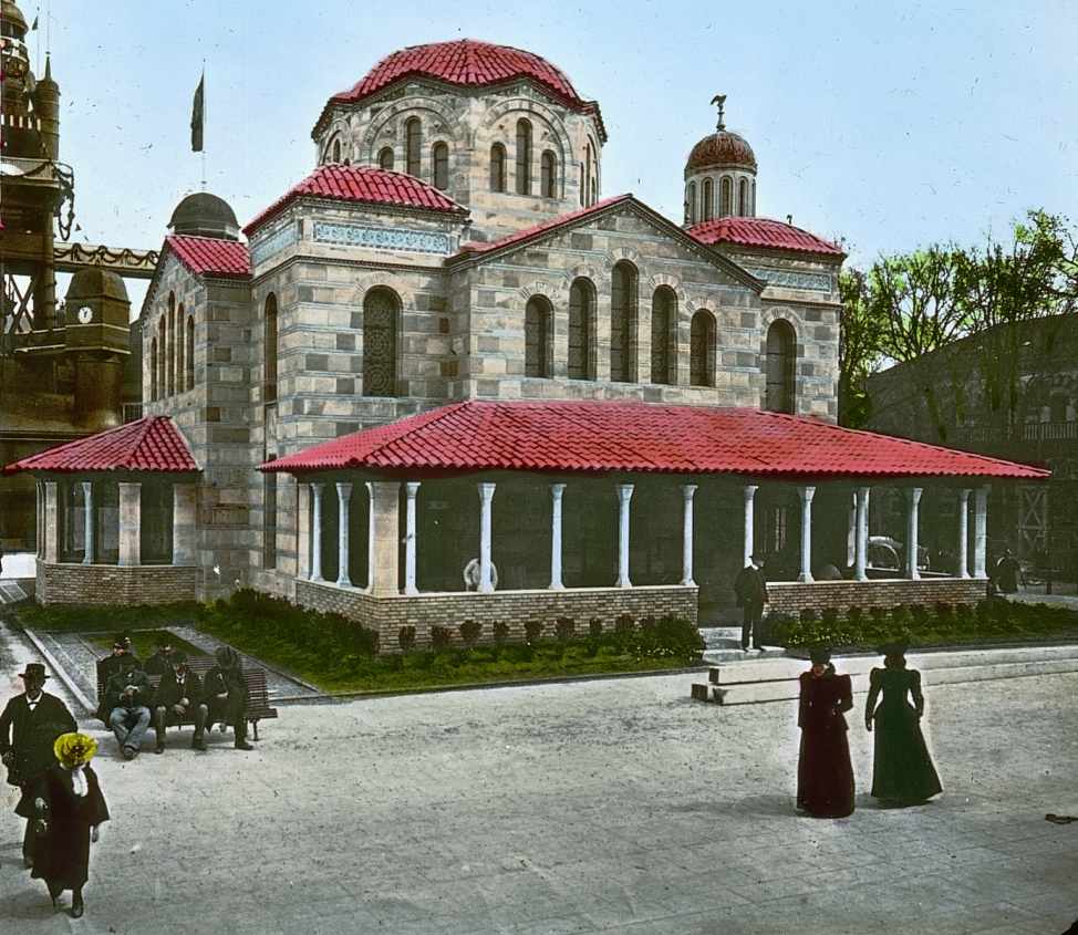 Le pavillon de la Grèce à l'exposition universelle de Paris en 1900. Pavillon néo-byzantin, Lucien Magne, architecte.